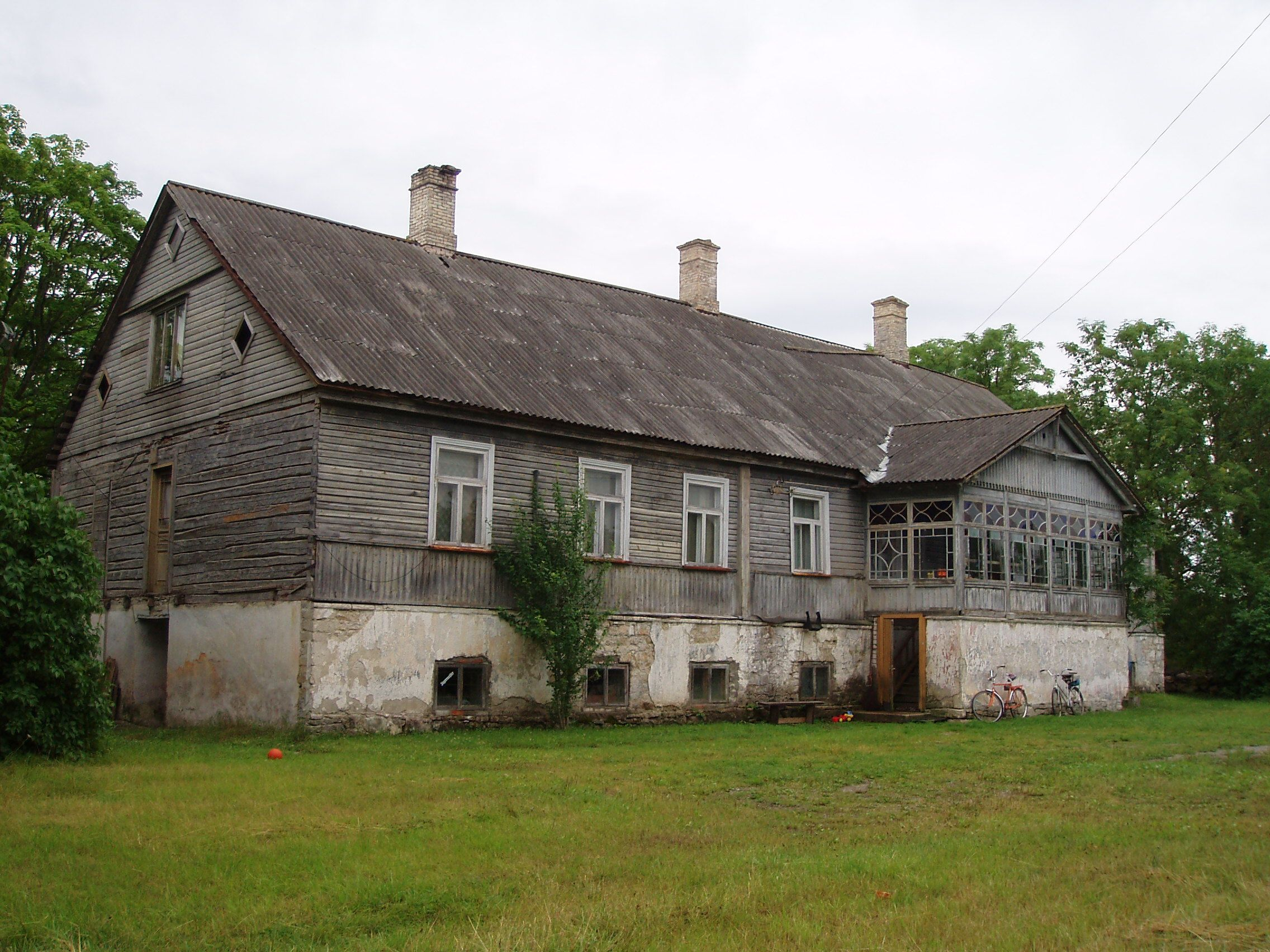 Taaliku mõisa peahoone